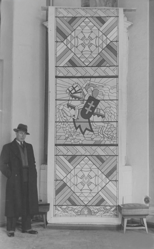 Язэп Горыд побач з вітражом, выкананым для афіцэрскага казіно ў Вільні.